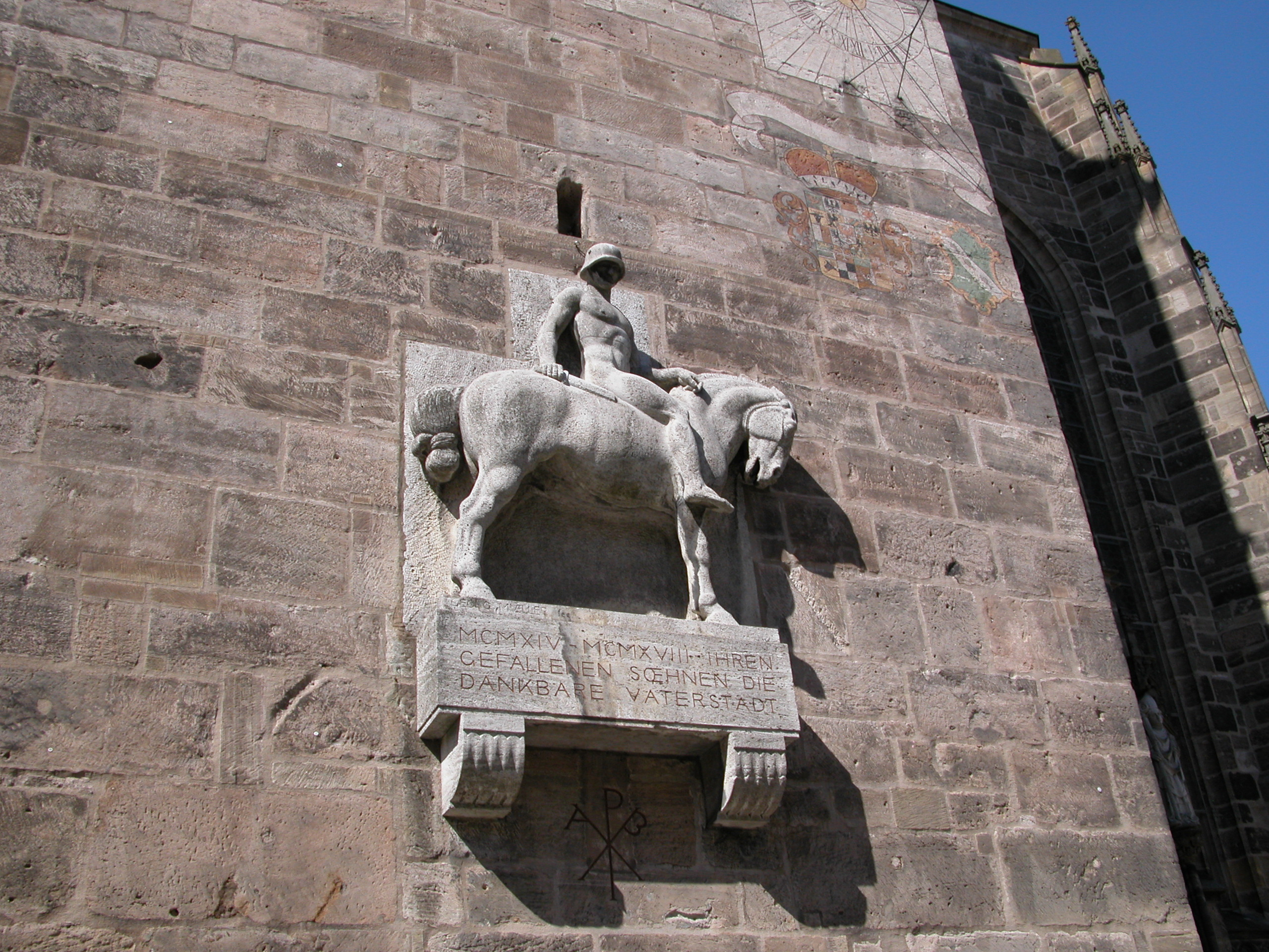 Kriegerdenkmal 1914-18 an der ev. Johanniskirche zu Ansbach/Bayern